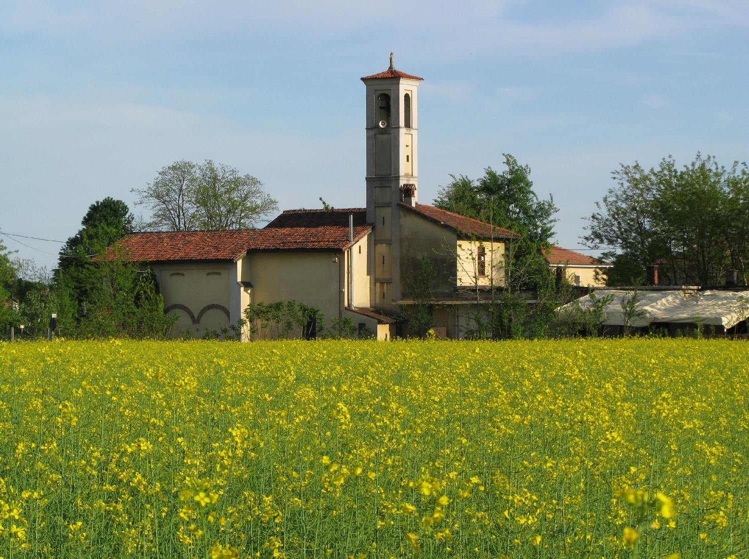 Chiesetta di Madonna in Veroncora This is a photo of a monument which is part of cultural heritage of Italy.